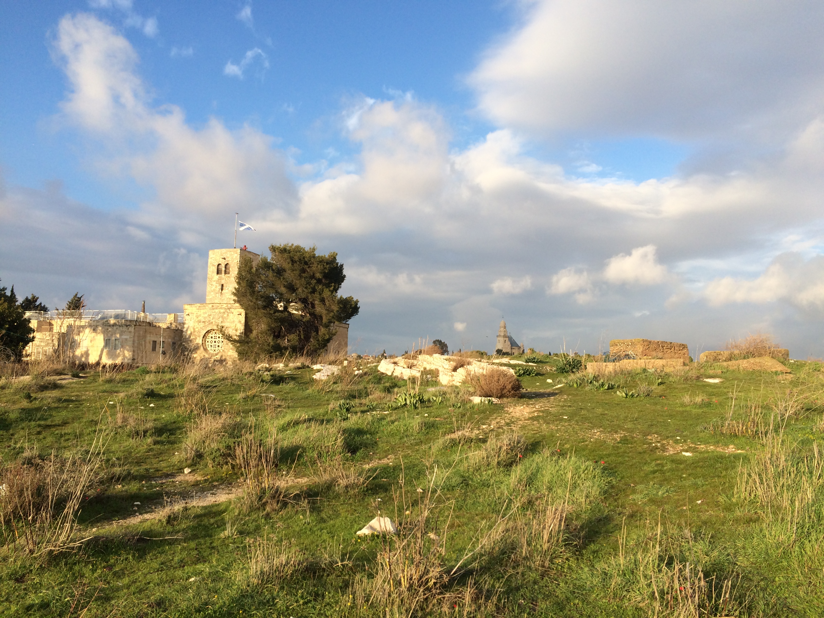 כנסיית סנט אנדרוז נמצאת על מורדות גבעת התנ"ך. הכנסייה שייכת לכנסייה של סקוטלנד, והיא נבנתה כמונומנט הנצחה לחיילים הסקוטים בצבא בריטי, חללי מלחמת העולם הראשונה.